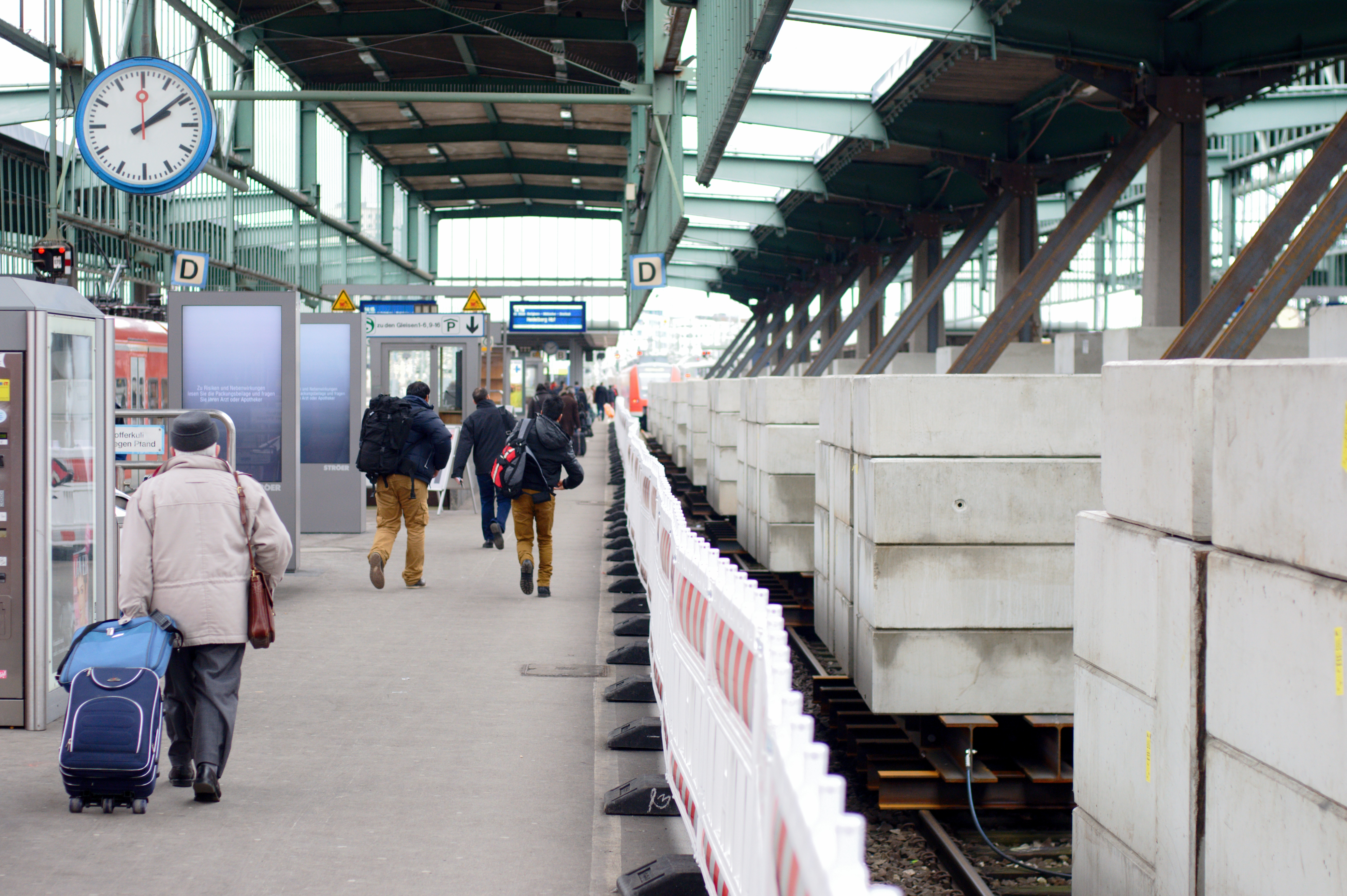 Bei den Umbauten für Stuttgart 21 wurden an Gleis 8 die Dachstützen mit Betongewichten verstärkt. Der Kopf von Gleis 8 wurde deshalb nach vorn verlegt.